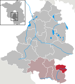 Dahmetal in Brandenburg (Country) - District Teltow-Fläming